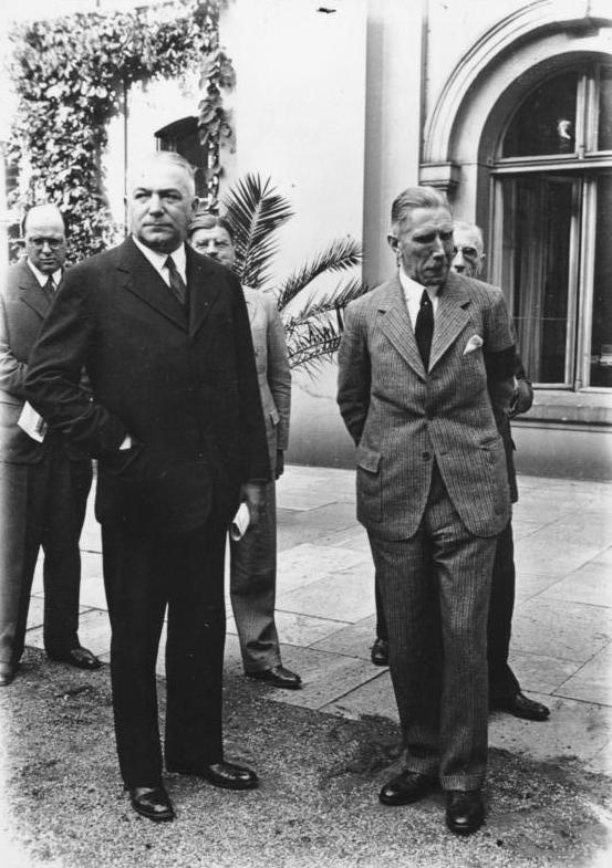 Kabinett Papen 1932. links von Neurath und von Papen